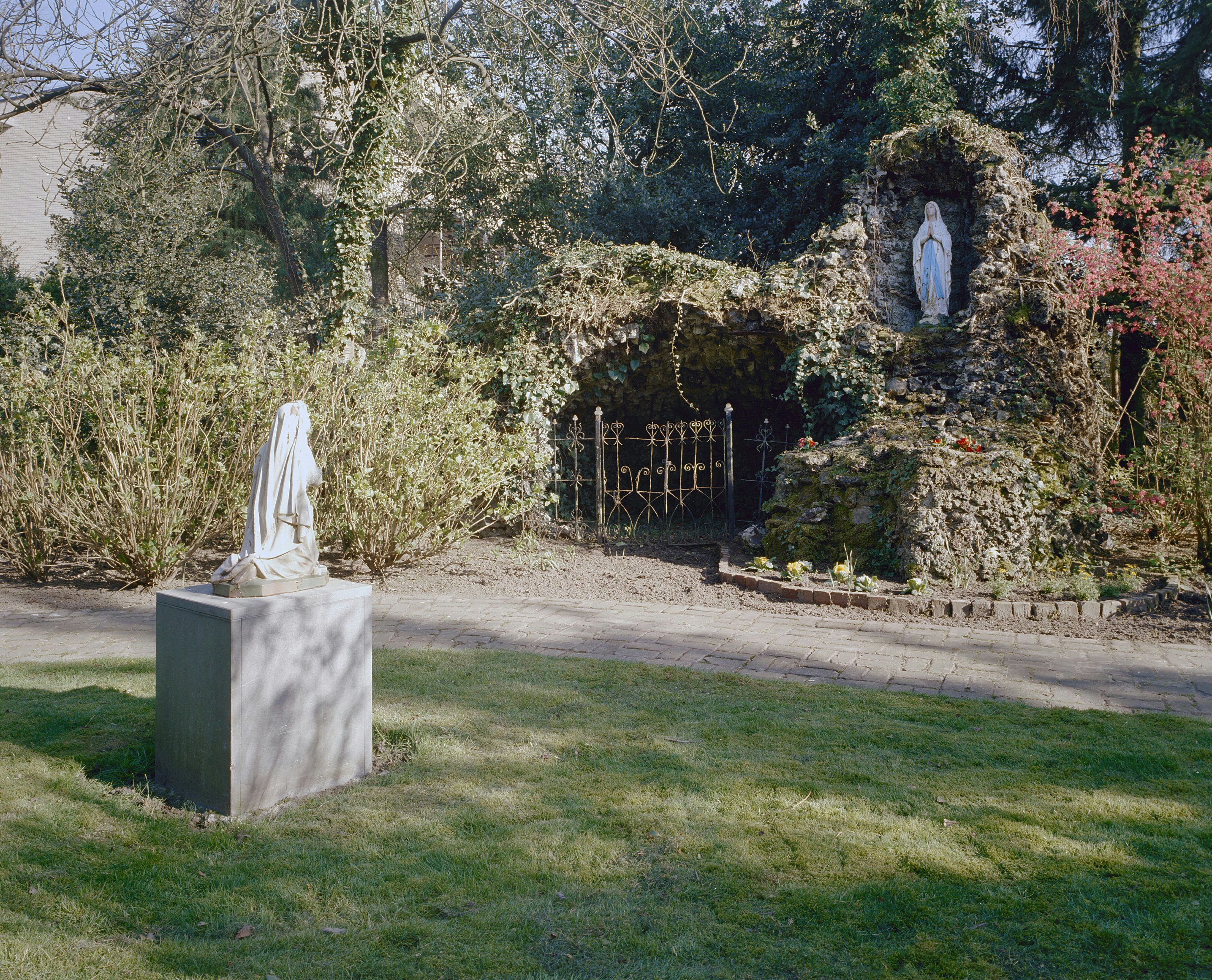 Voormalig Klooster Sint Anna: Lourdesgrot met beeld van Maria en Bernadette